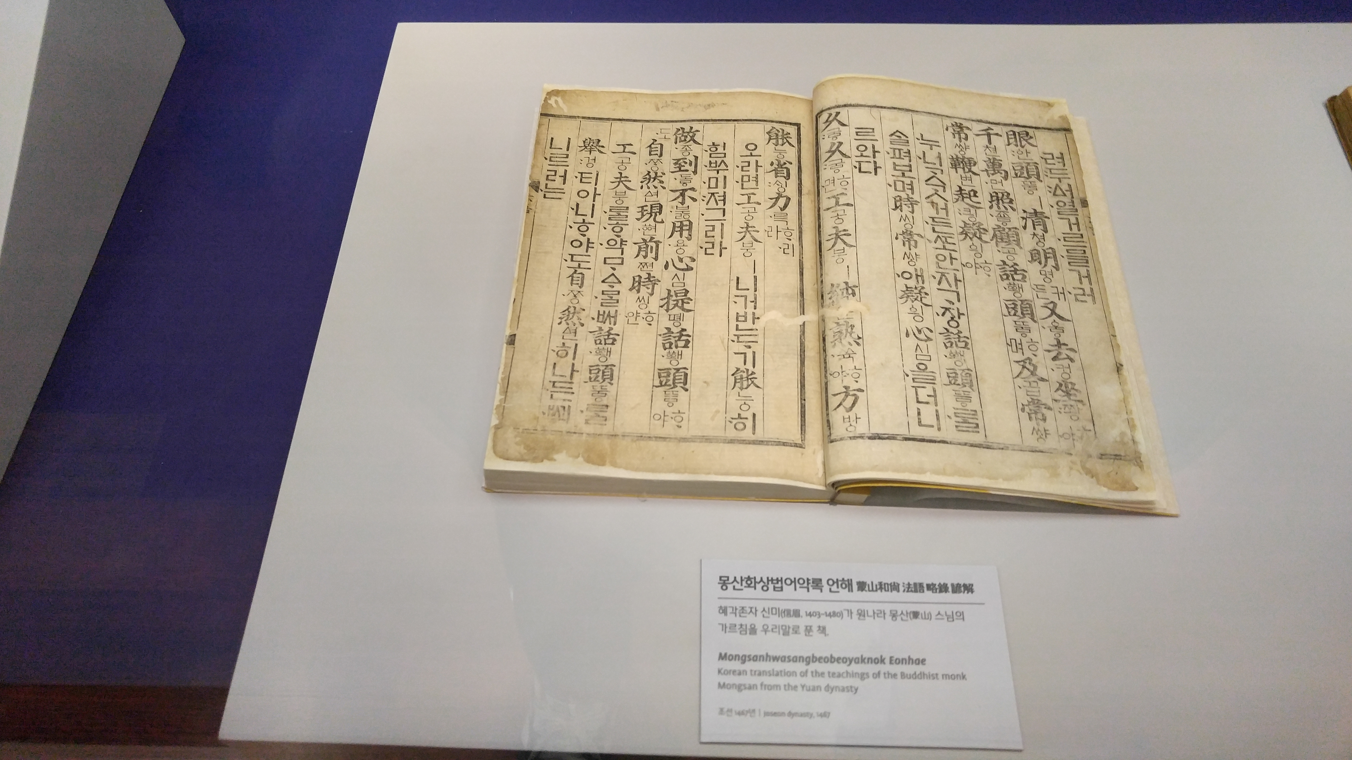 몽산화상법어약록 언해